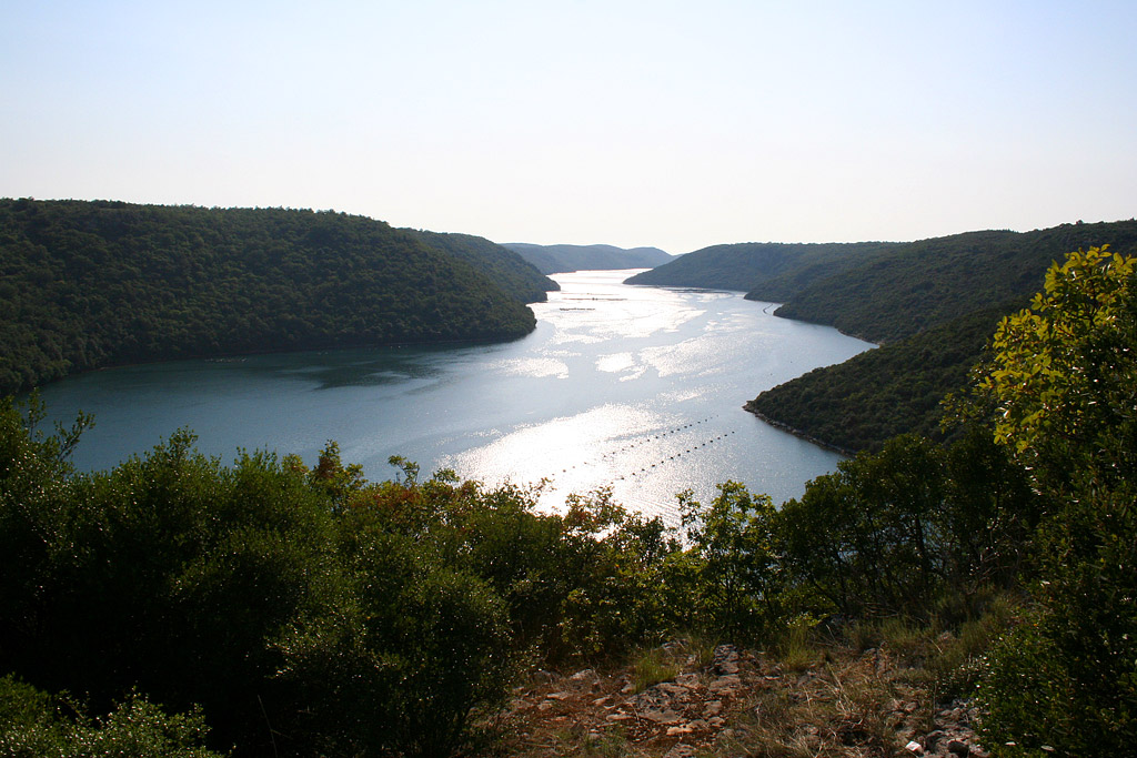 Вид на Лимский канал с верхней смотровой площадки